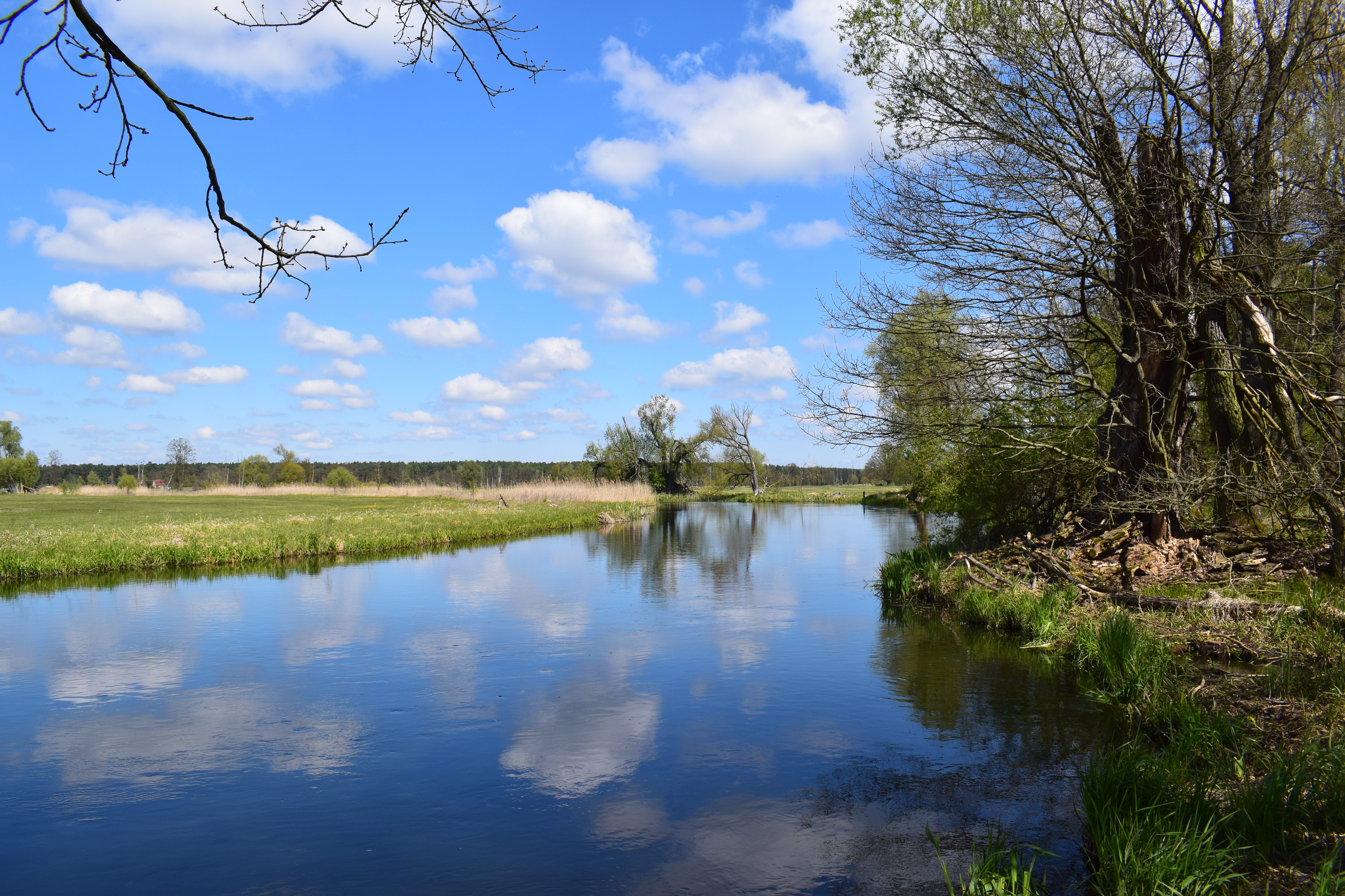 Spree bei Kirchhofen, Gemeinde Spreenhagen, Brandenburg.